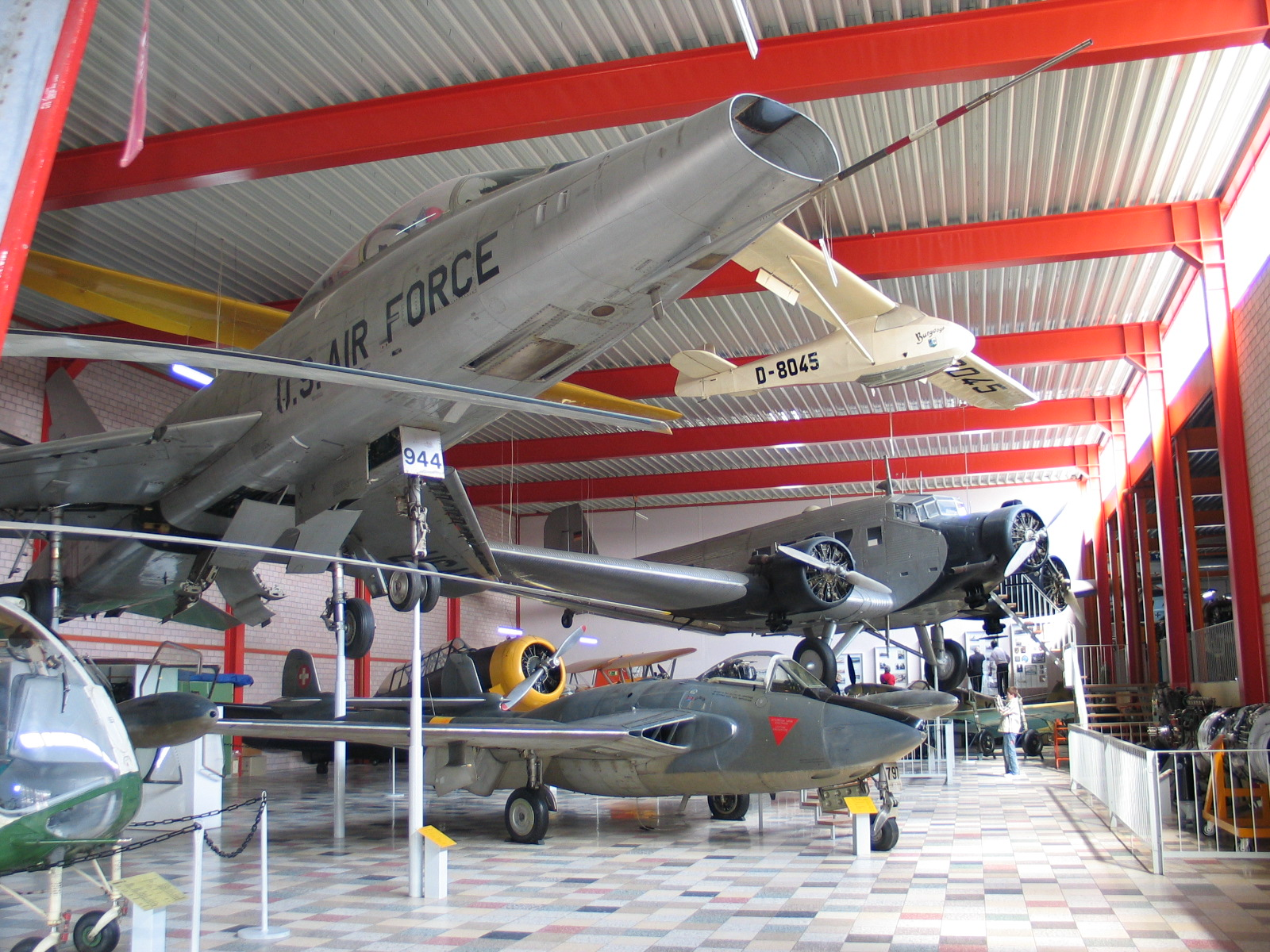 Inkomhal van de luchtvaartentoonstelling in Hermeskeil - eigen foto